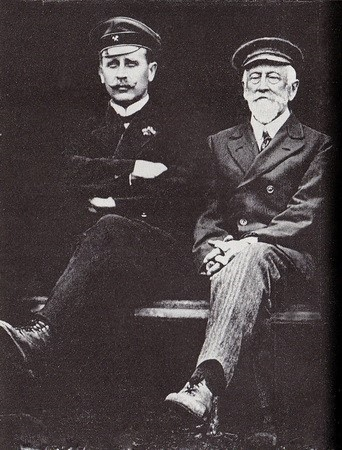 Эдуард Боссе (1854—1927) и Роберт Петрович Вагнер — тесть Э. Т. Боссе, инженер, многолетний управляющий машиностроительного завода Боссе